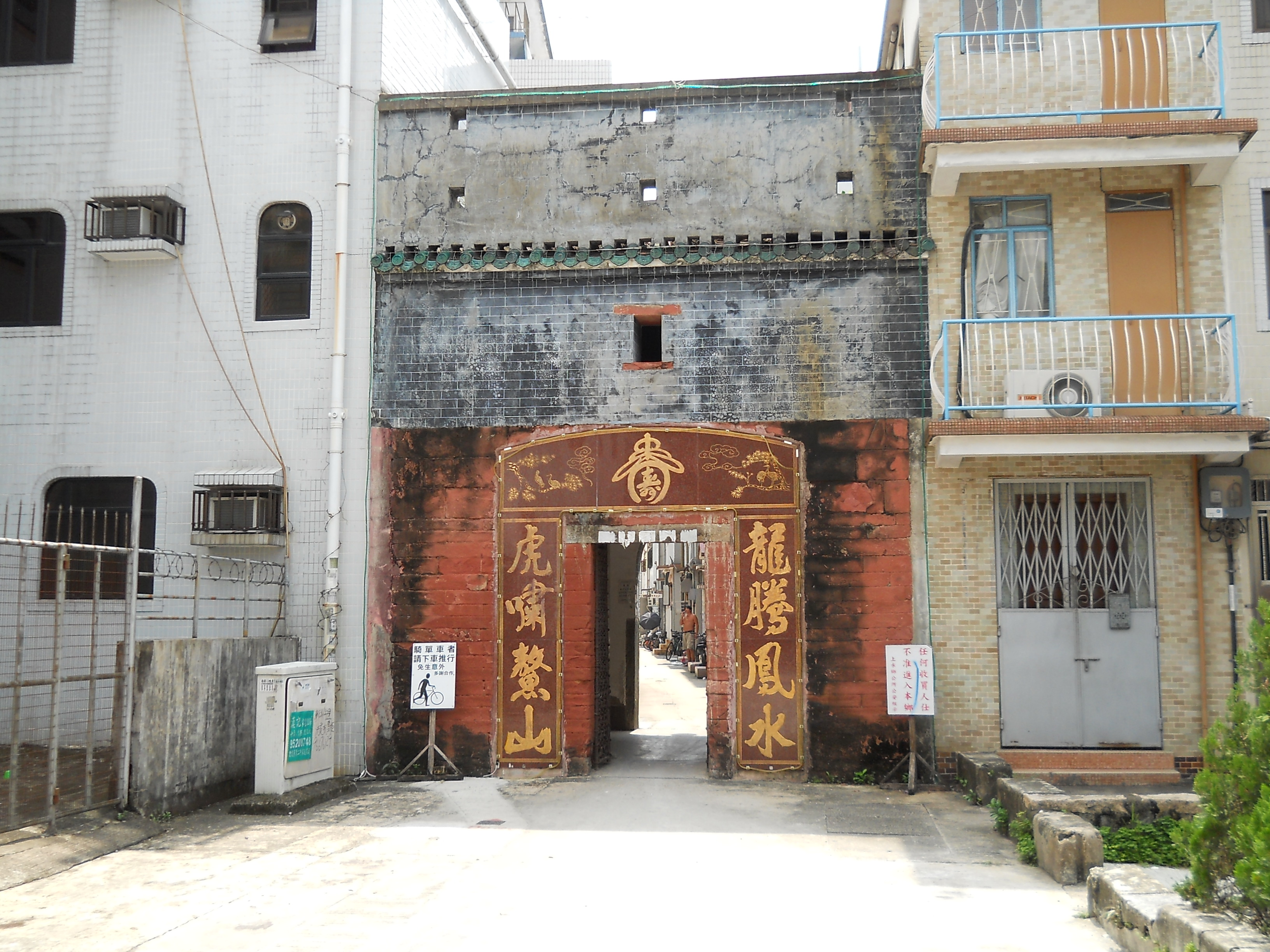 中文（香港）: 上水圍